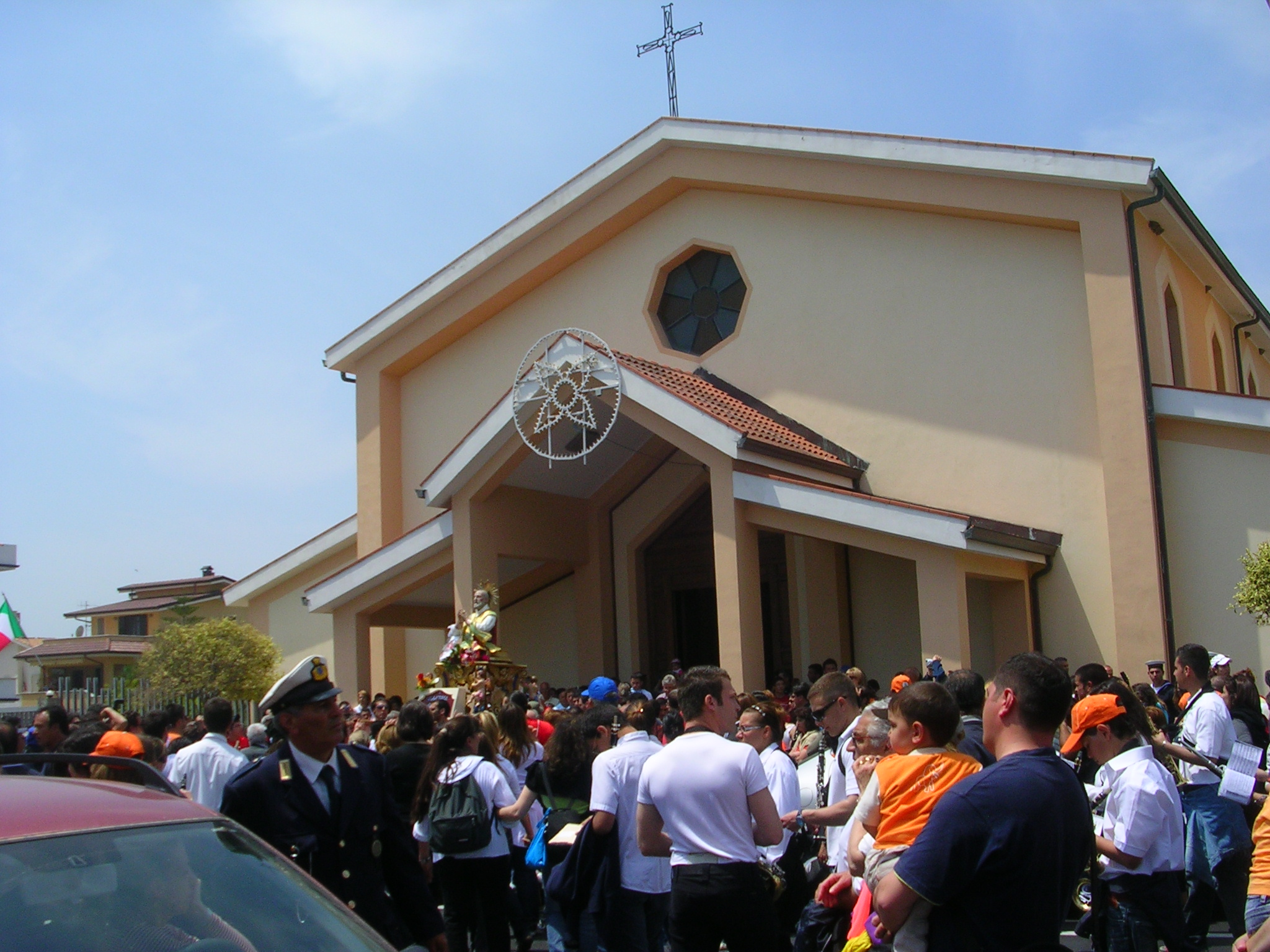 Sosta_nella_chiesa_di_monasterace_marina